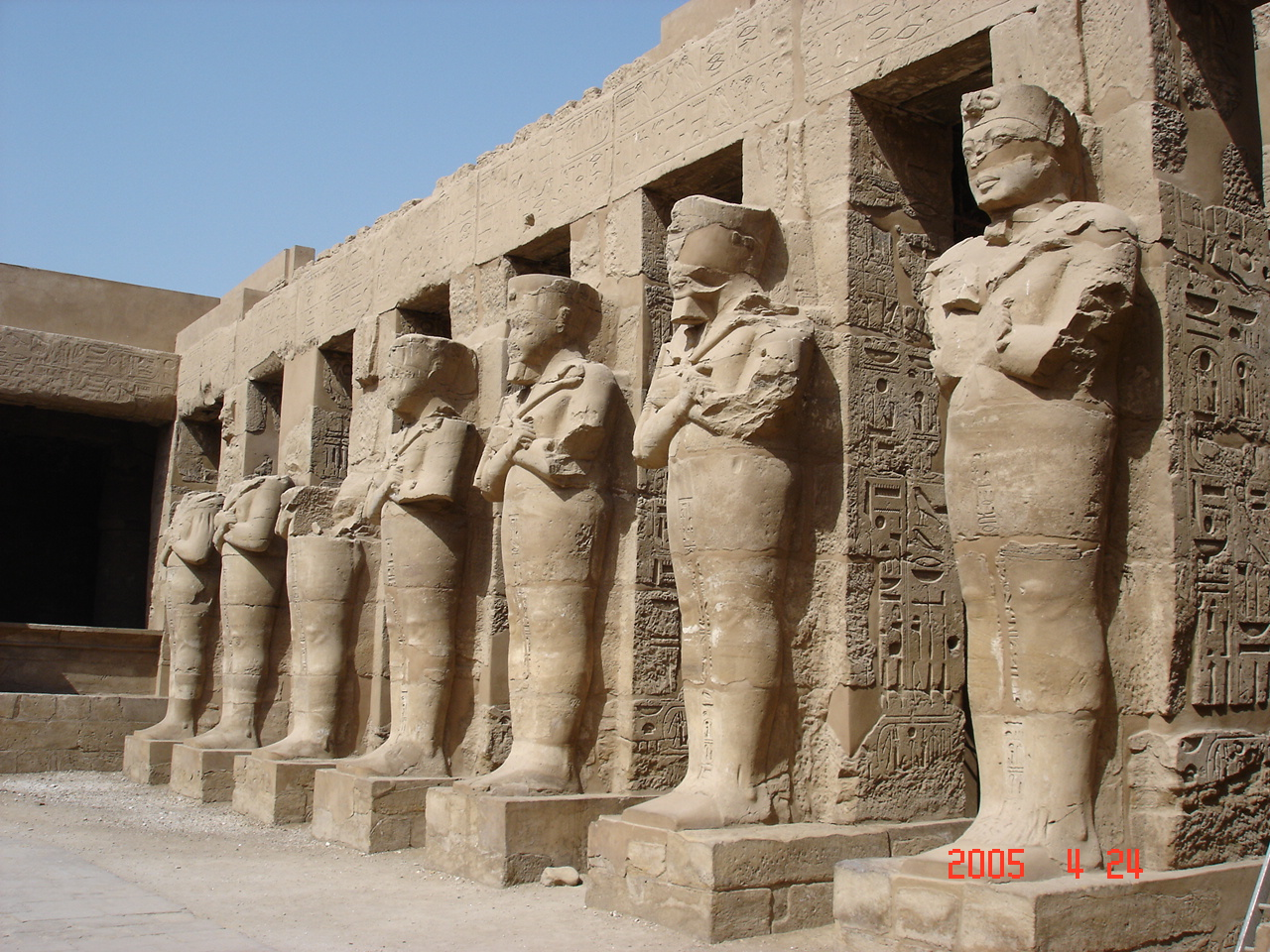 III. Ramszesz Ozirisz szobrai (Egyiptom, Karnak)